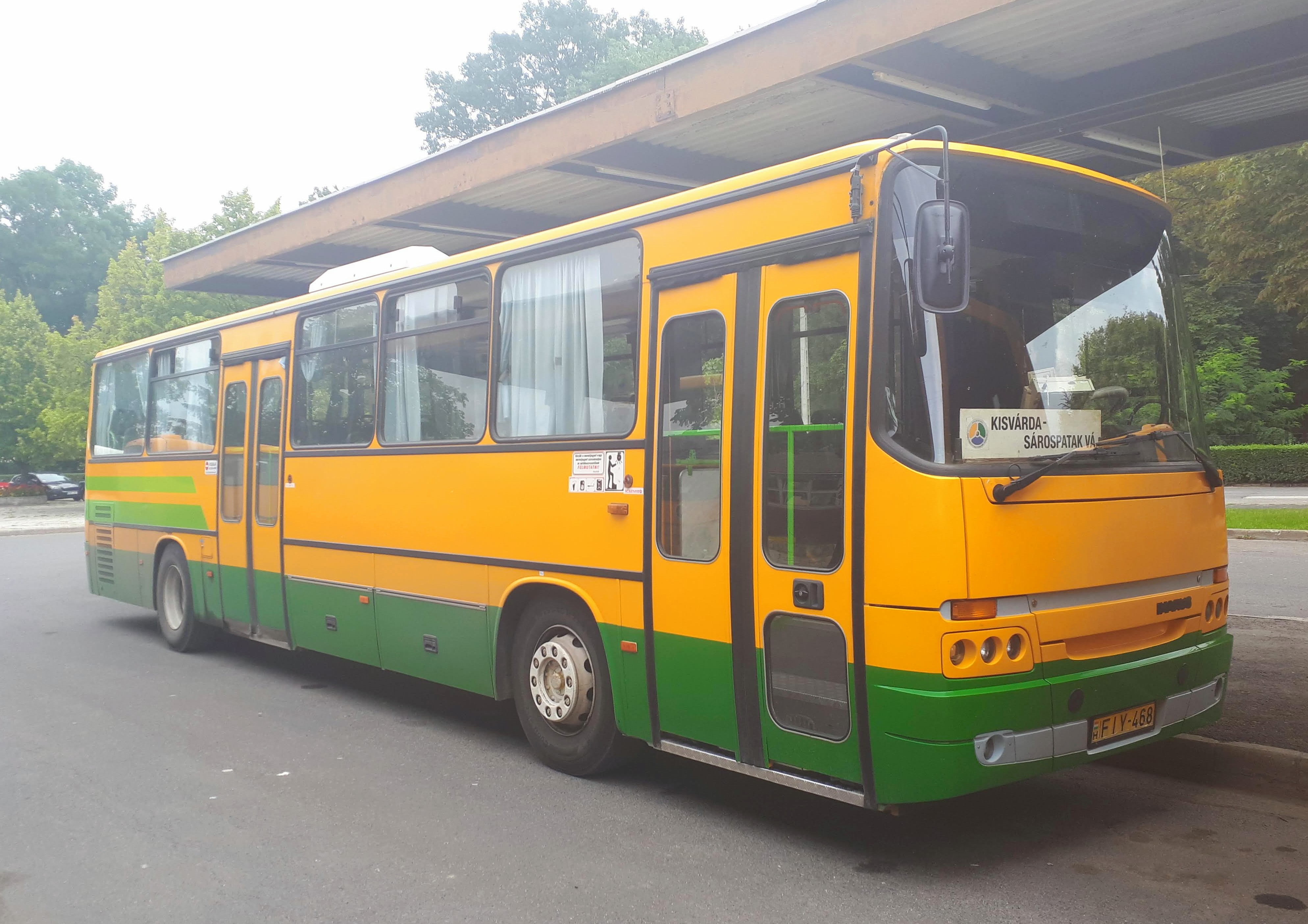 Az ÉMKK FIY-468 rendszámú Ikarus 256 típusú busza Sárospatakon, a 3888-as helyközi járaton.